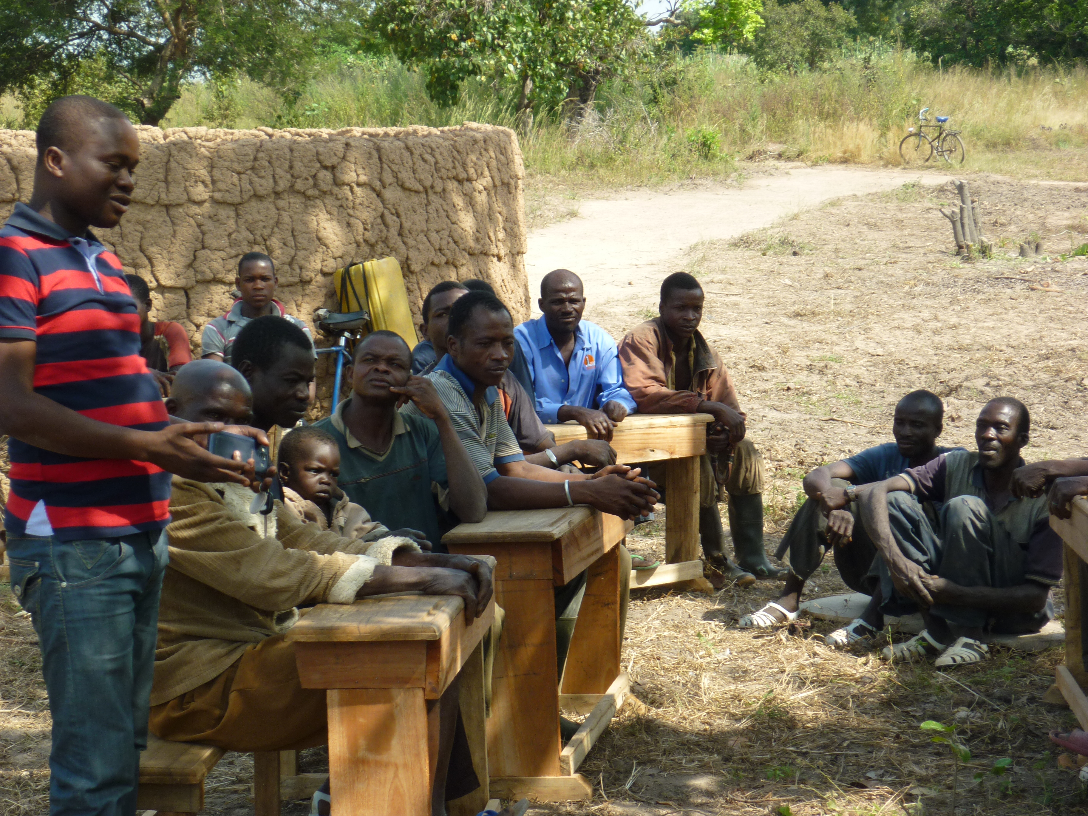 Une classe d'alphabétisation en plein air avec des apprenants d'âge adulte dans une zone rurale de la Côte d'Ivoire. This is an image of "African people at work" from Ivory Coast